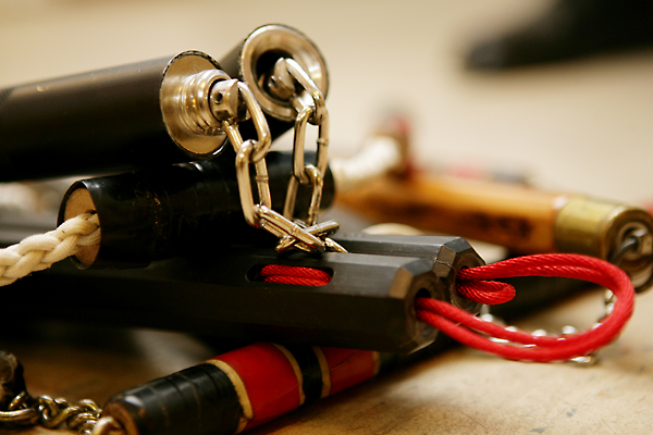 Das Nunchaku [nɯn.tɕa.kɯ] (chin.: 雙節棍, shuāng jié gùn; 兩節棍, liǎng jié gùn "paargliedriger Stock"; 二節棍, èr jié gùn "zweigliedriger Stock"; jap